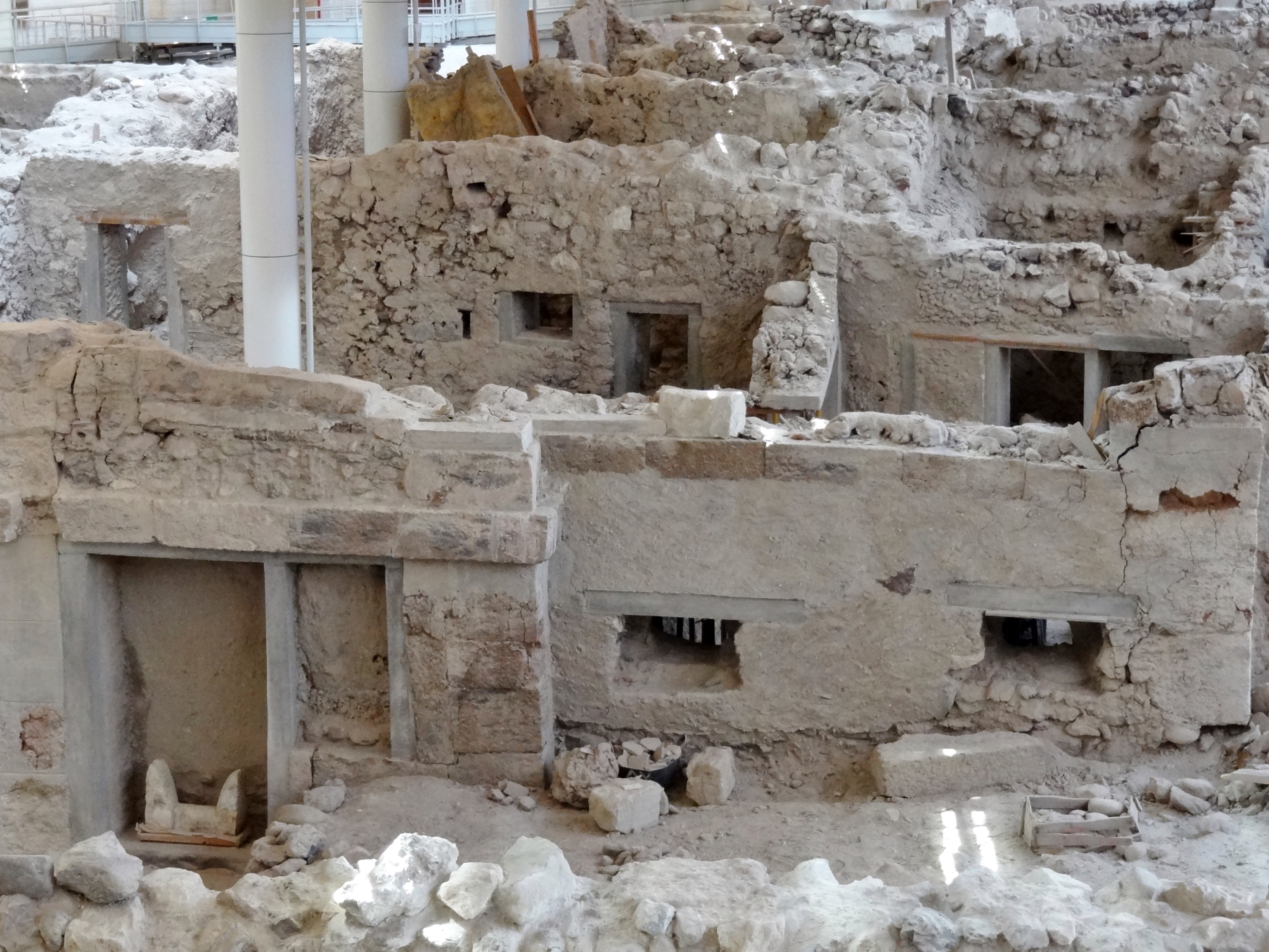 Ausgrabungsstätte von Akrotiri auf Santorin, Kykladen, Griechenland